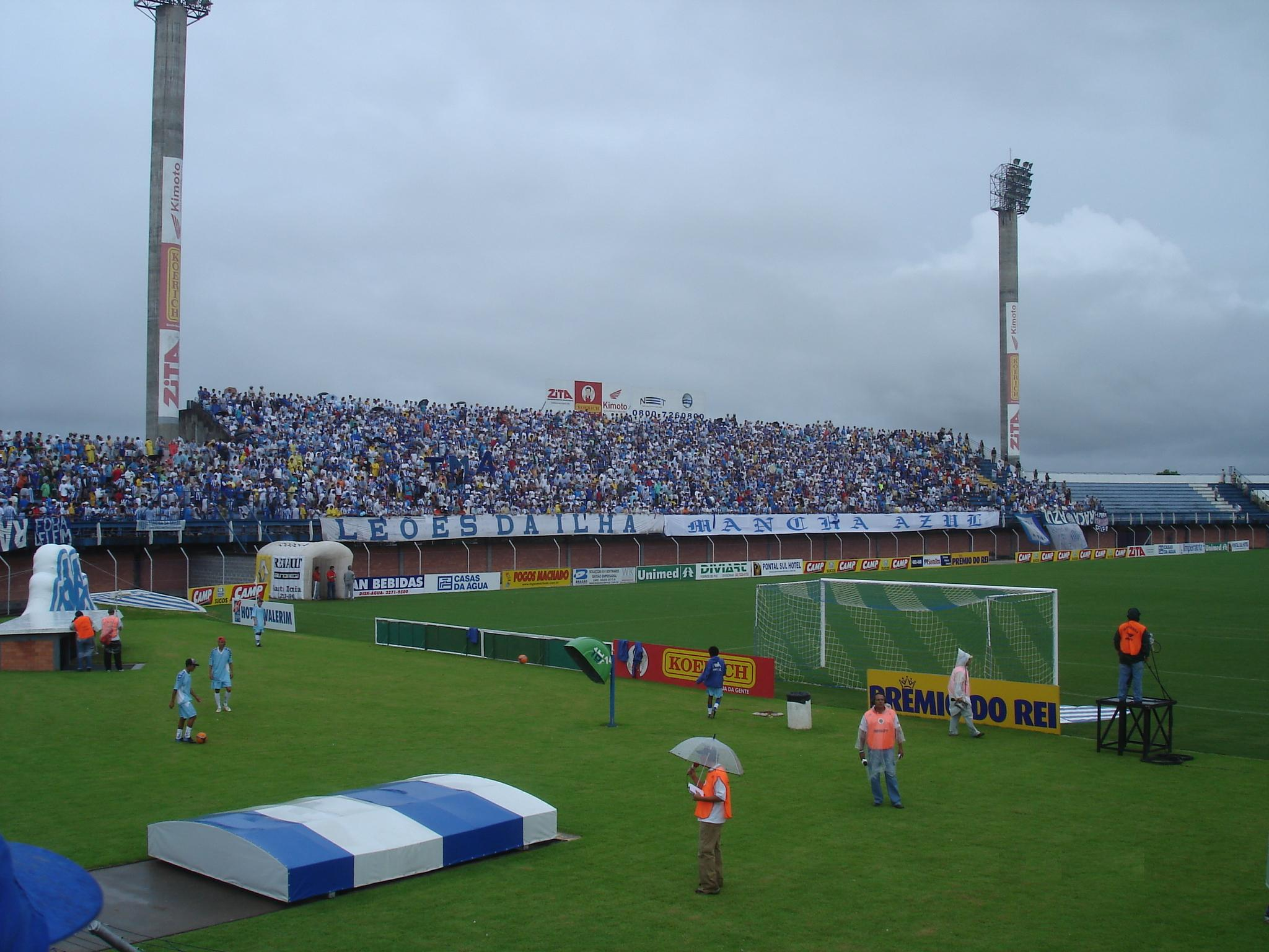 Ressacada